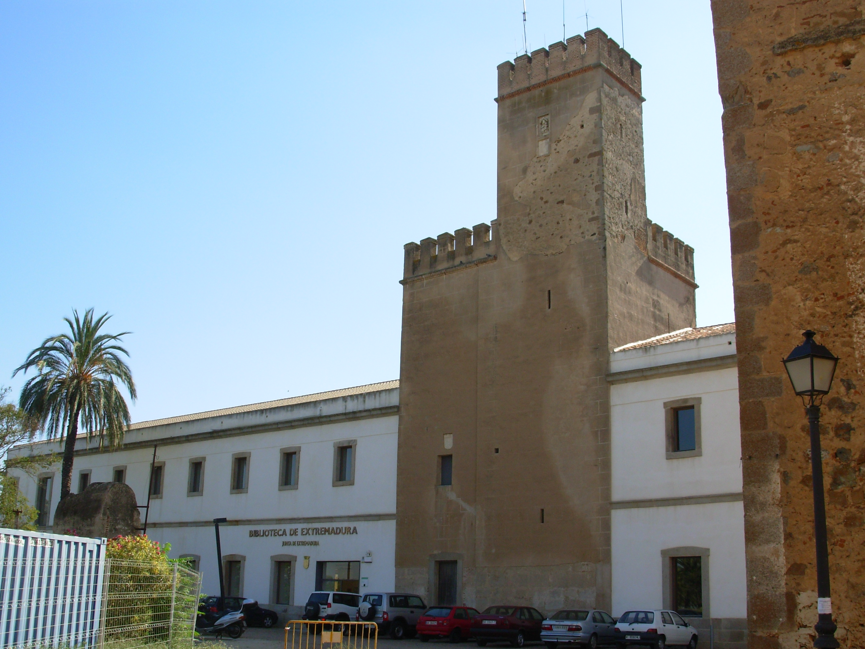 Torre de Santa María en la Alcazaba de Badajoz